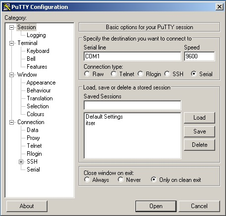 Nestavení Putty na lokální port